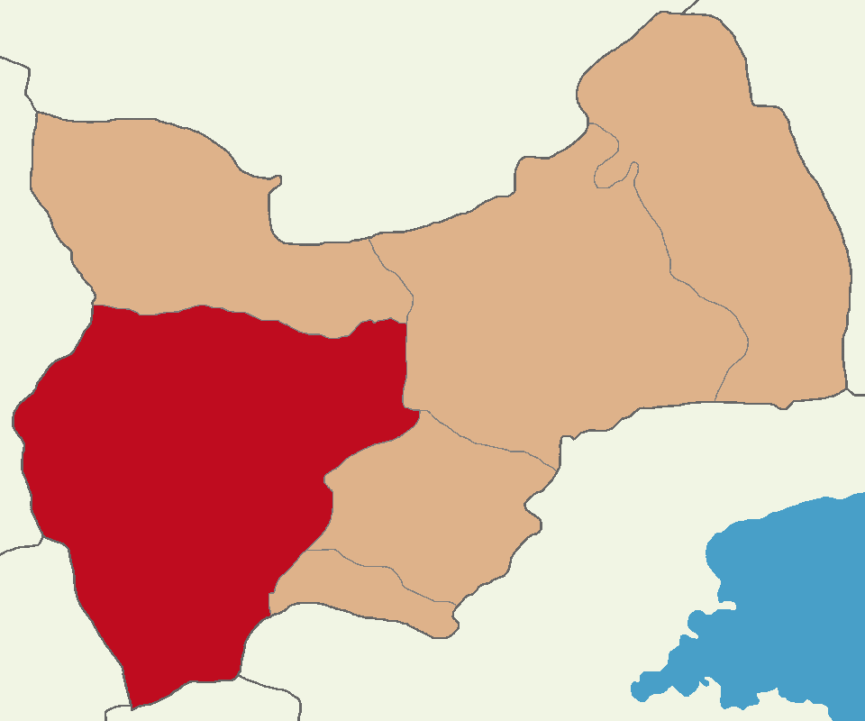 Muş Merkez ilçesinin konumu